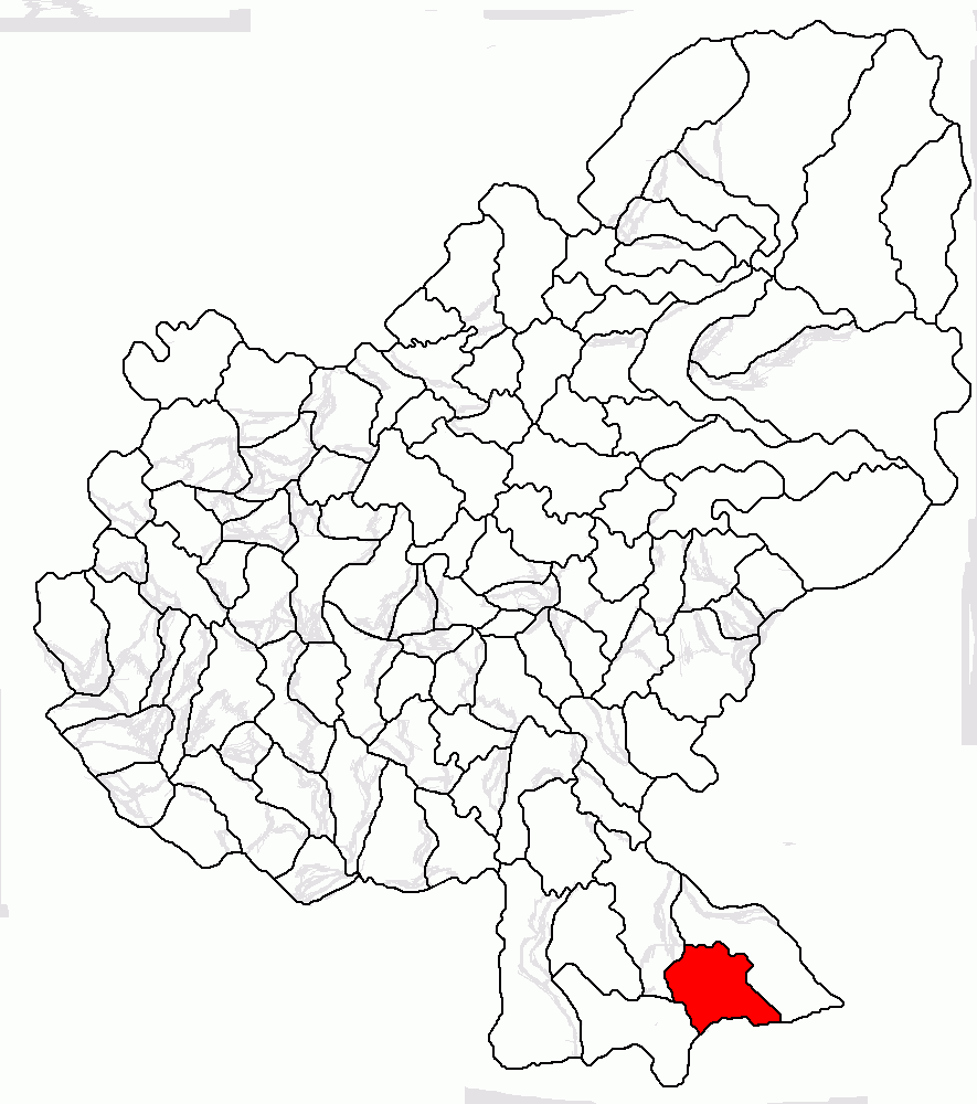 Categorie:Hărţi ale judeţului Mureş